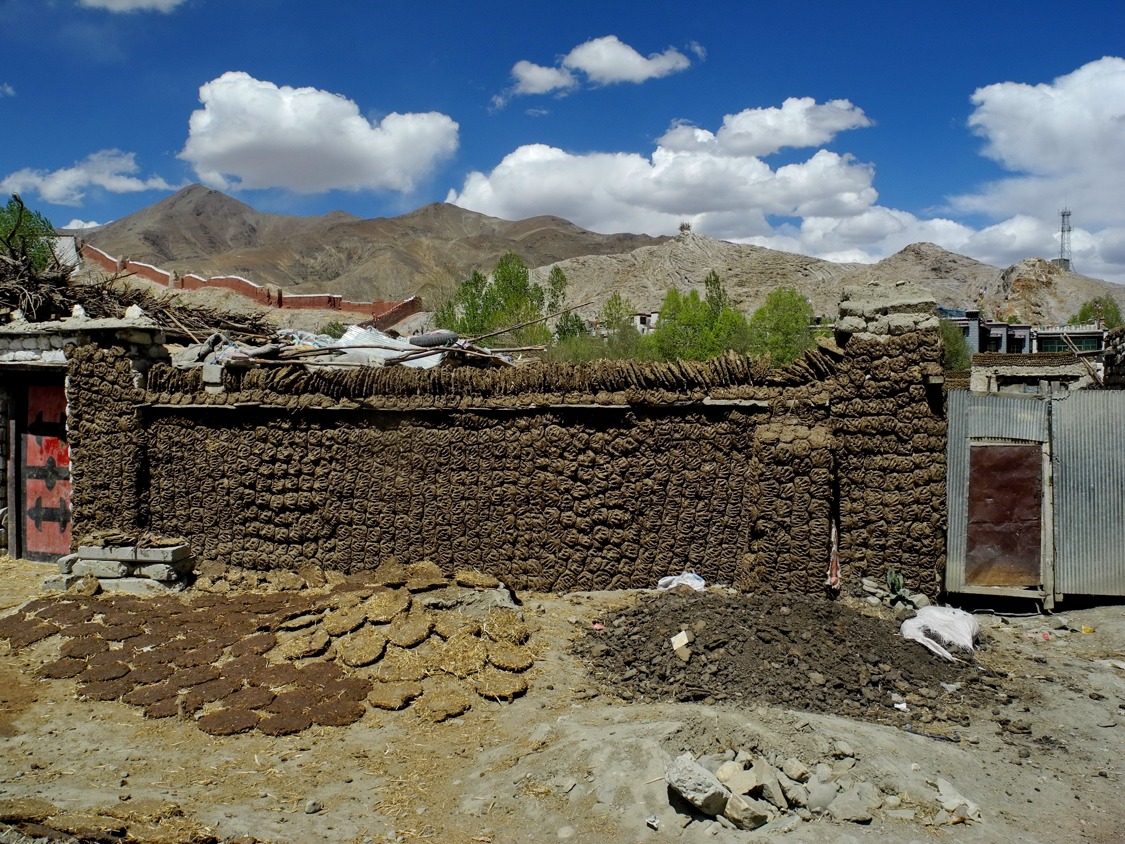 mur recouvert de bous de yak